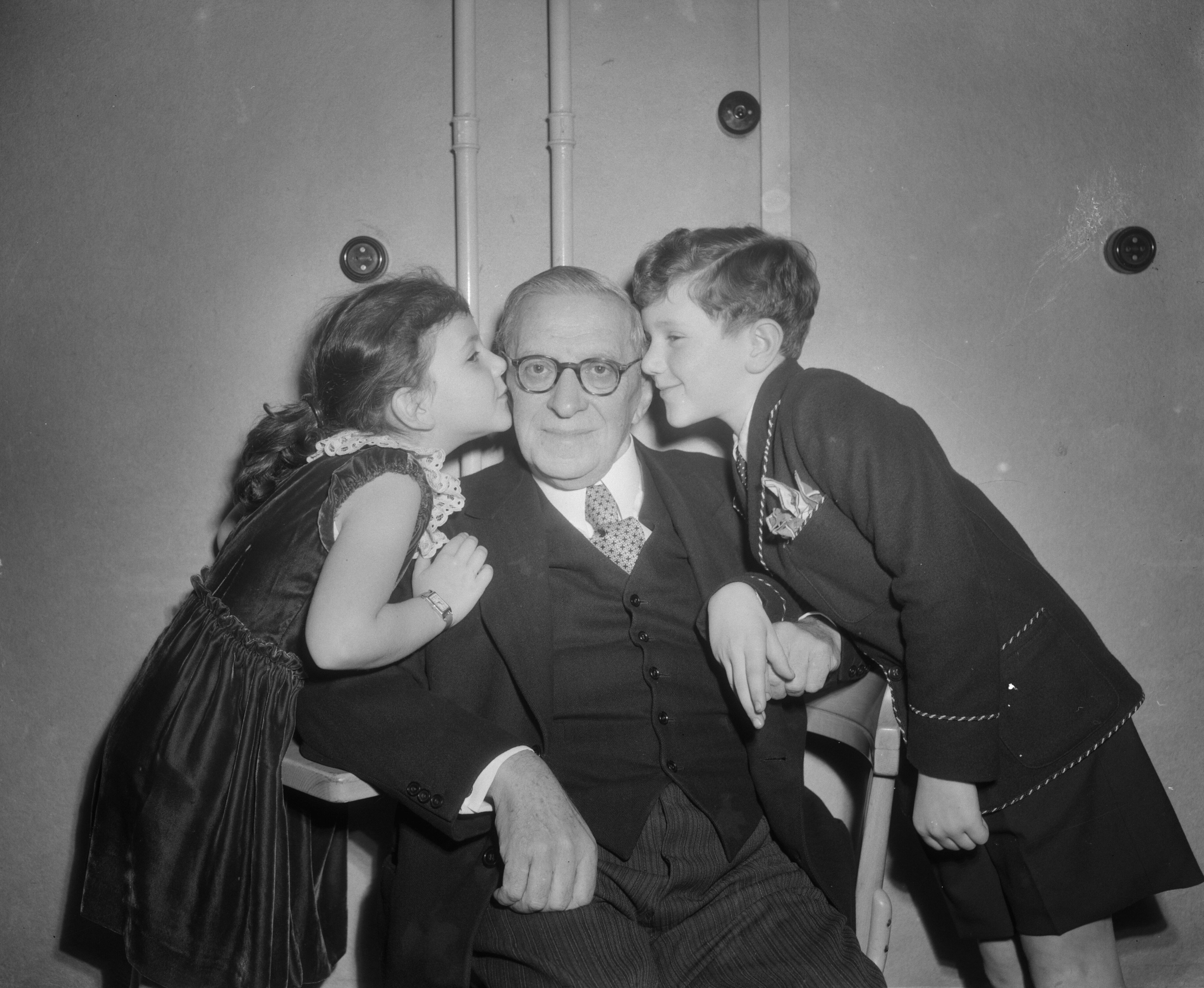 Collectie / Archief : Fotocollectie Anefo Reportage / Serie : [ onbekend ] Beschrijving : Prof. Dr. Revesz 75 jaar (DG) huldiging Amsterdam Datum : 9 december 1953 Locatie : Amsterdam, Noord-Holland Trefwoorden : huldigingen Persoonsnaam : Prof. Dr. Revesz Fotograaf : Duinen, […] van / Anefo Auteursrechthebbende : Nationaal Archief Materiaalsoort : Negatief (zwart/wit) Nummer archiefinventaris : bekijk toegang 2.24.01.04 Bestanddeelnummer : 906-1614